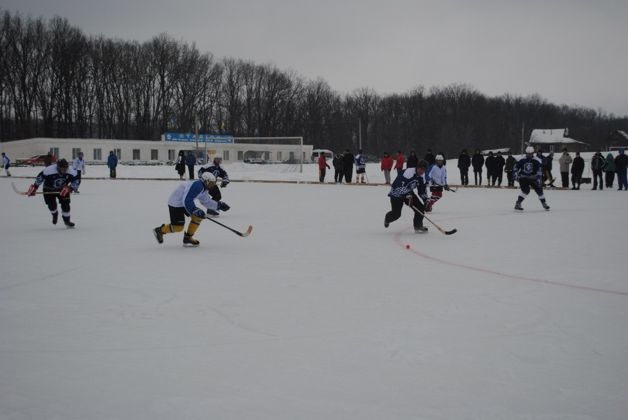 Чемпіонат України 2015